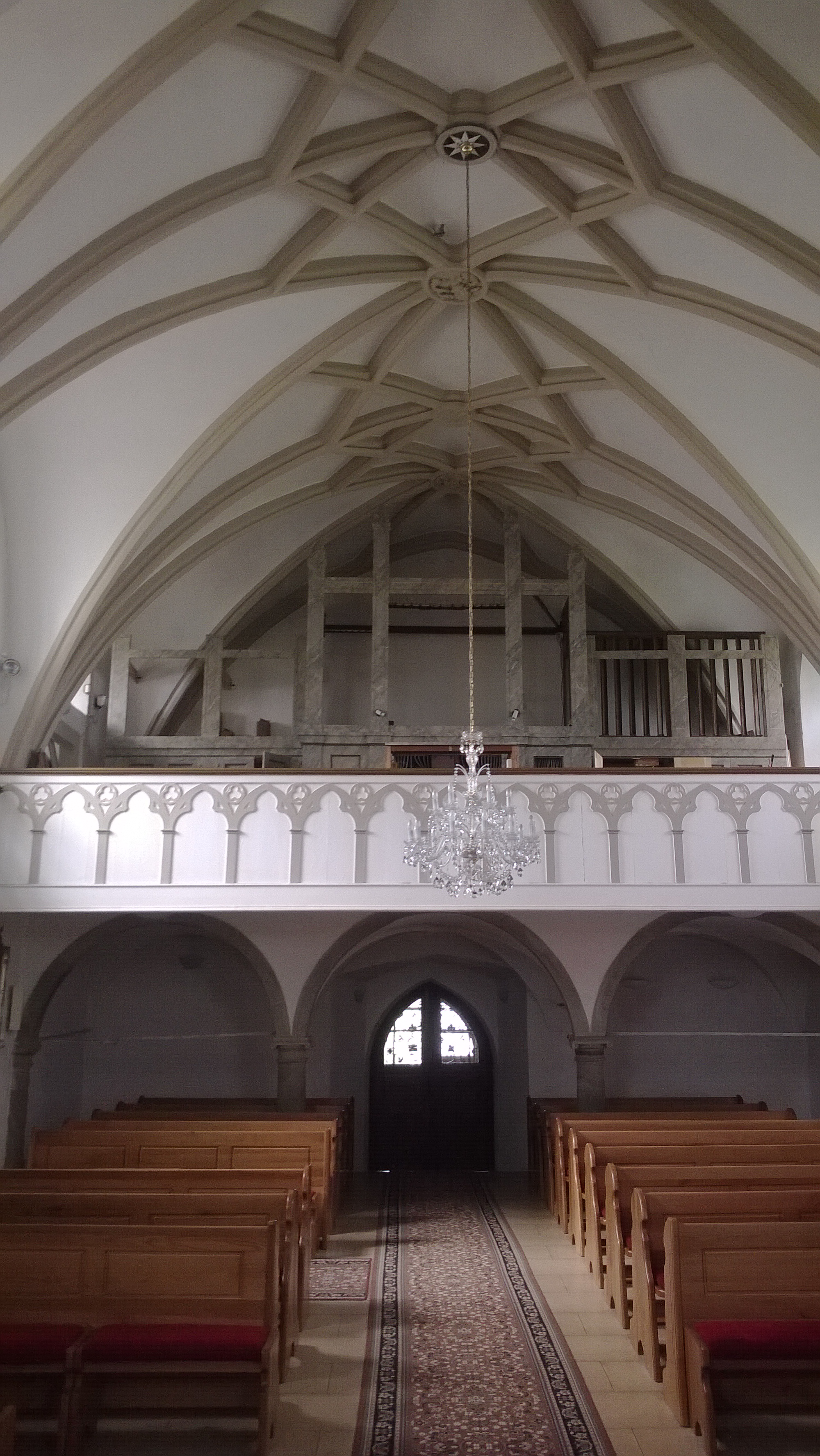 kůr v zadní části kostela